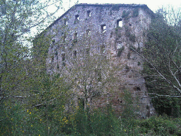 Antiga papeleira de Fontán en O Castro, Lousame.